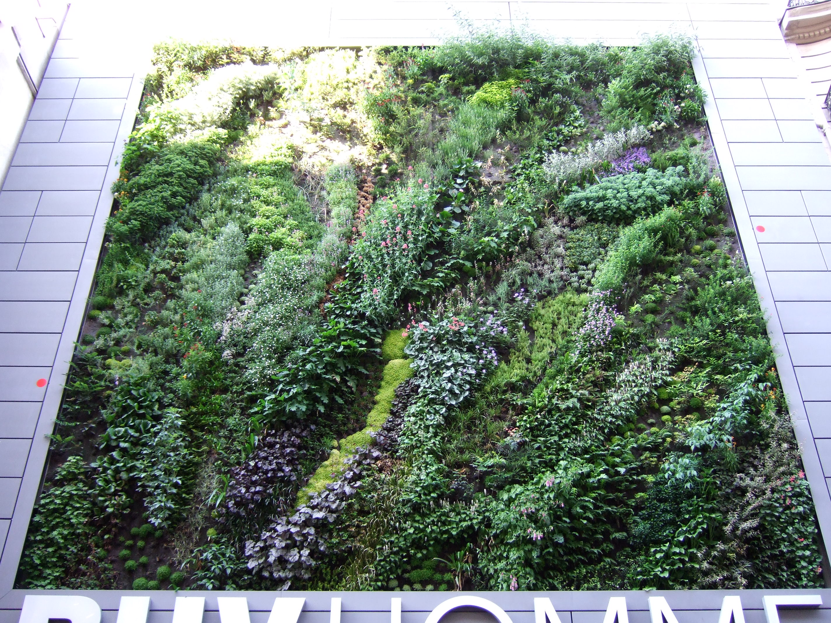 Jardin vertical au dessus du magasin BHV Homme, rue de la Verrerie, IVe arrondissement, Paris, France.